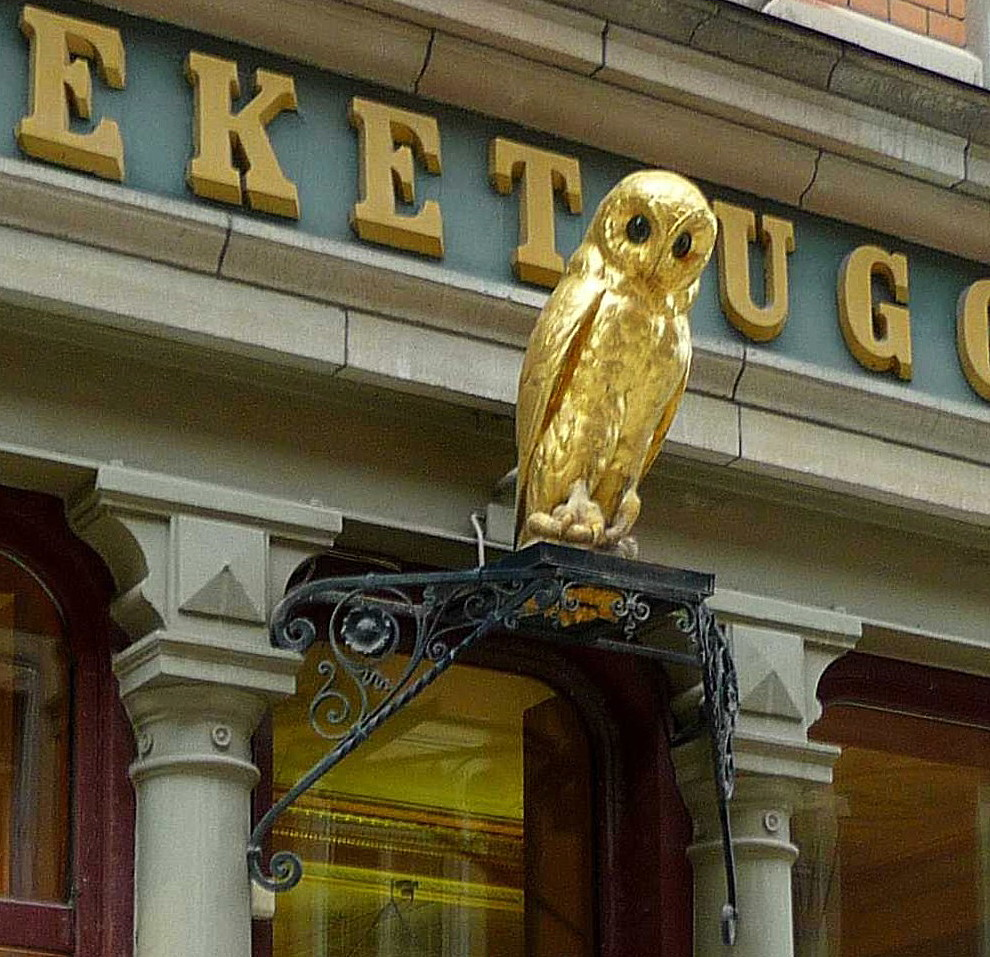 Apoteket Ugglans förgyllda uggla